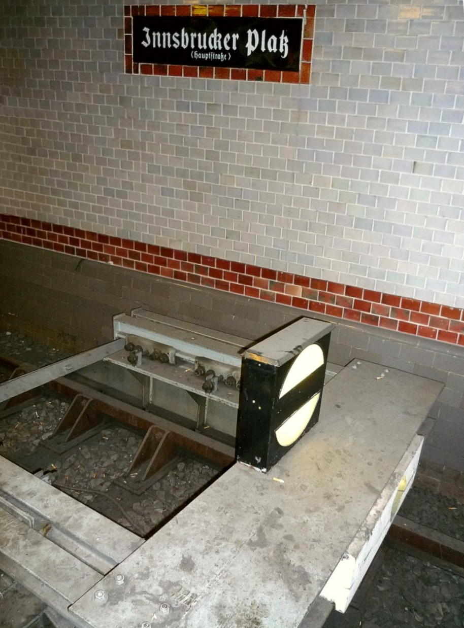 Berlin, U-Bahnlinie 4, Endbahnhof Innsbrucker Platz.